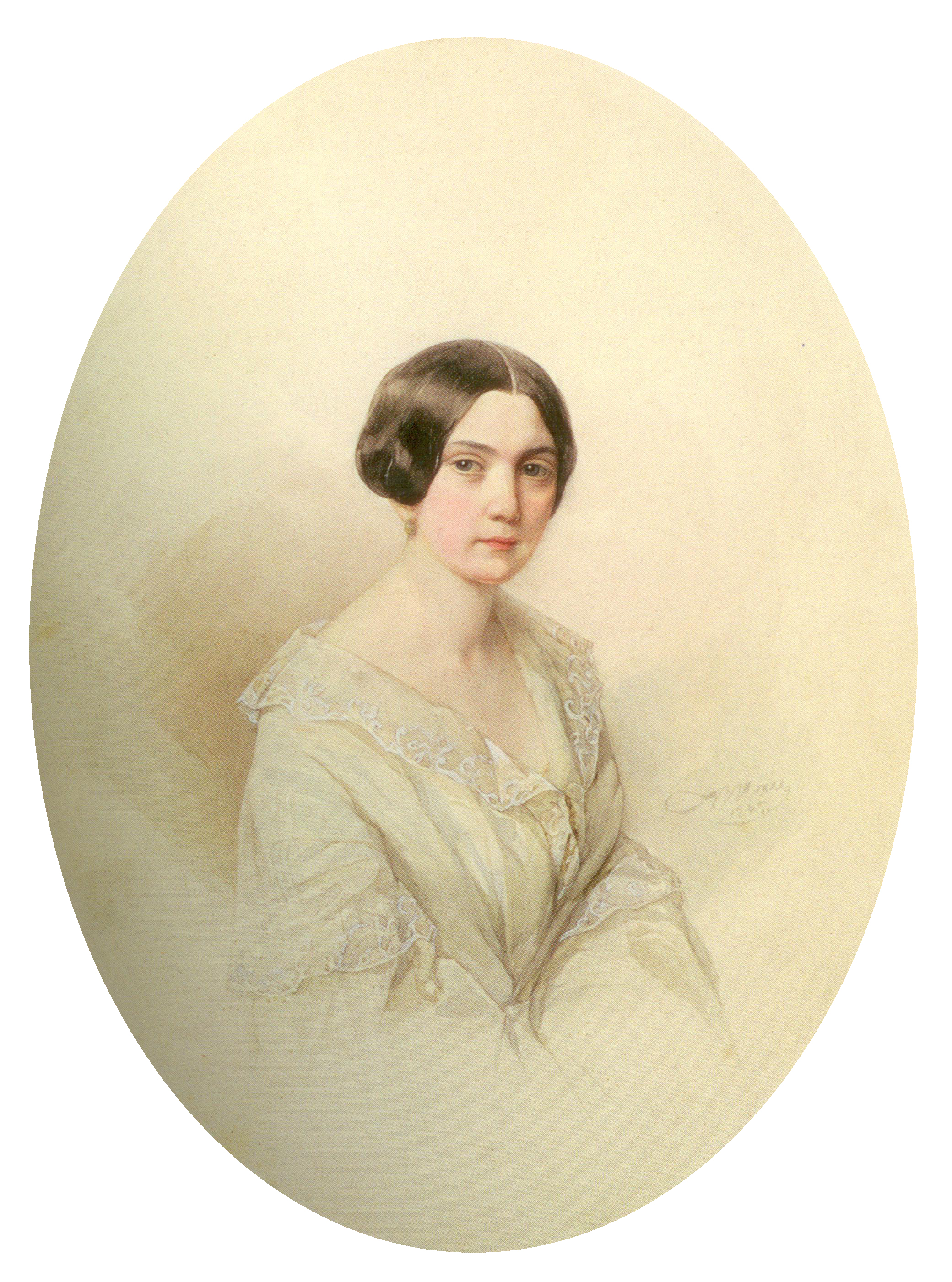 Графиня Мария Петровна Валуева, ур. Вяземская (1813—1849), дочь поэта П.А.Вяземского.